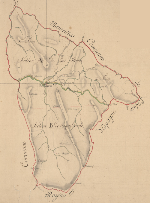 Antic terme de Riunoguers, de Morellàs i les Illes, en el Cadastre napoleònic del 1812 (Arxius Departamentals dels Pirineus Orientals)